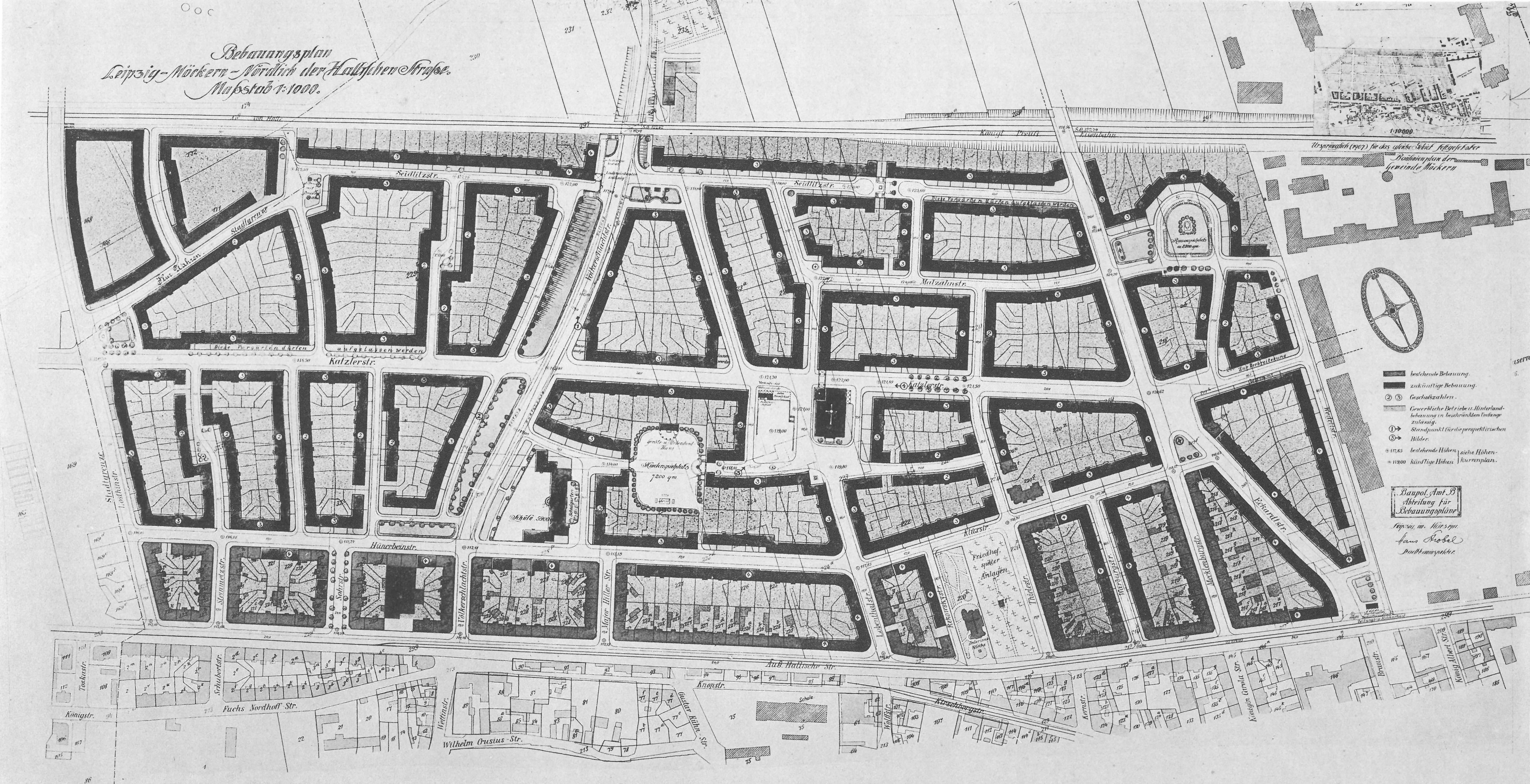 Lageplan Bebauung Möckern März 1911